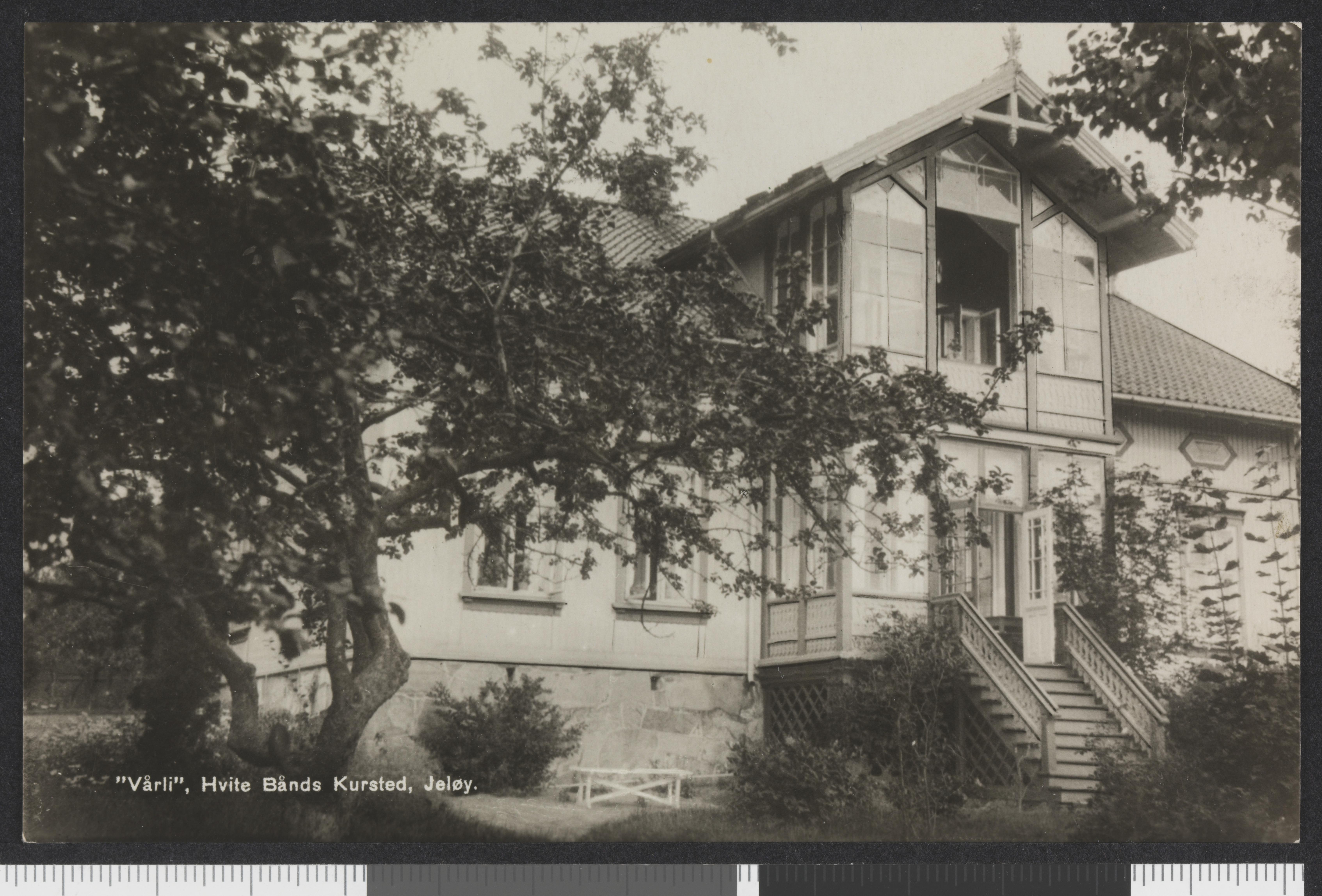 Bildet er hentet fra Nasjonalbibliotekets bildesamling Jeløya, Moss, Østfold